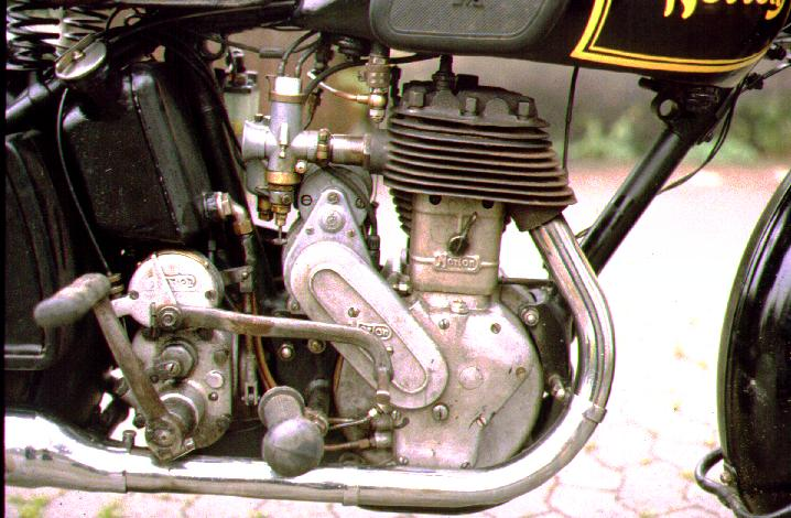 Norton 16H 010